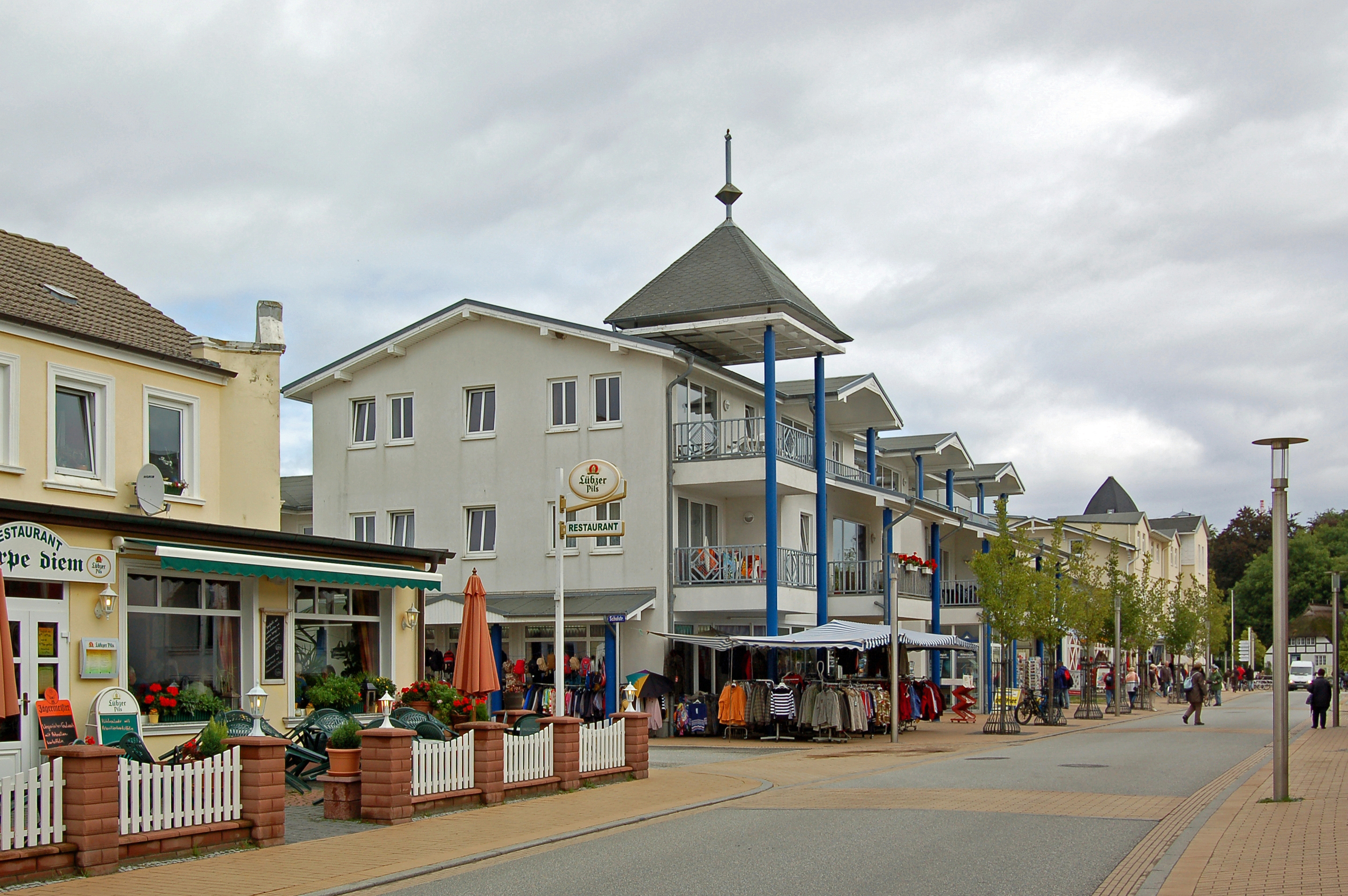 Die Gemeinde Göhren liegt auf der Halbinsel Mönchgut im Südosten der Insel Rügen. Göhren wurde 1165 erstmals erwähnt. Ab 1326 Teil des Fürstentums Rügen. Ab 1648 gehörte Rügen zu Schwedisch-Pommern. Göhren entwickelte sich im 19. Jh. zu einem der bedeutendsten Ostseebäder. Der Bau einer Schmalspurbahn sorgte ab 1899 zu einer weiteren Entwicklung des Tourismus. Zu den Sehenswürdigkeiten des Ortes gehören die Seebrücke, mehr als 5 km langer und 30 m breiter Strand und natürlich die sog. Bäder-Architektur. Haupteinnahmequelle ist natürlich der Tourismus. Fischerei spielt keine große Rolle mehr. Seit der »Wende« wurde viel renoviert - vor allem die in der Bäder-Architektur errichteten Bauten wurden mit viel Liebe restauriert.